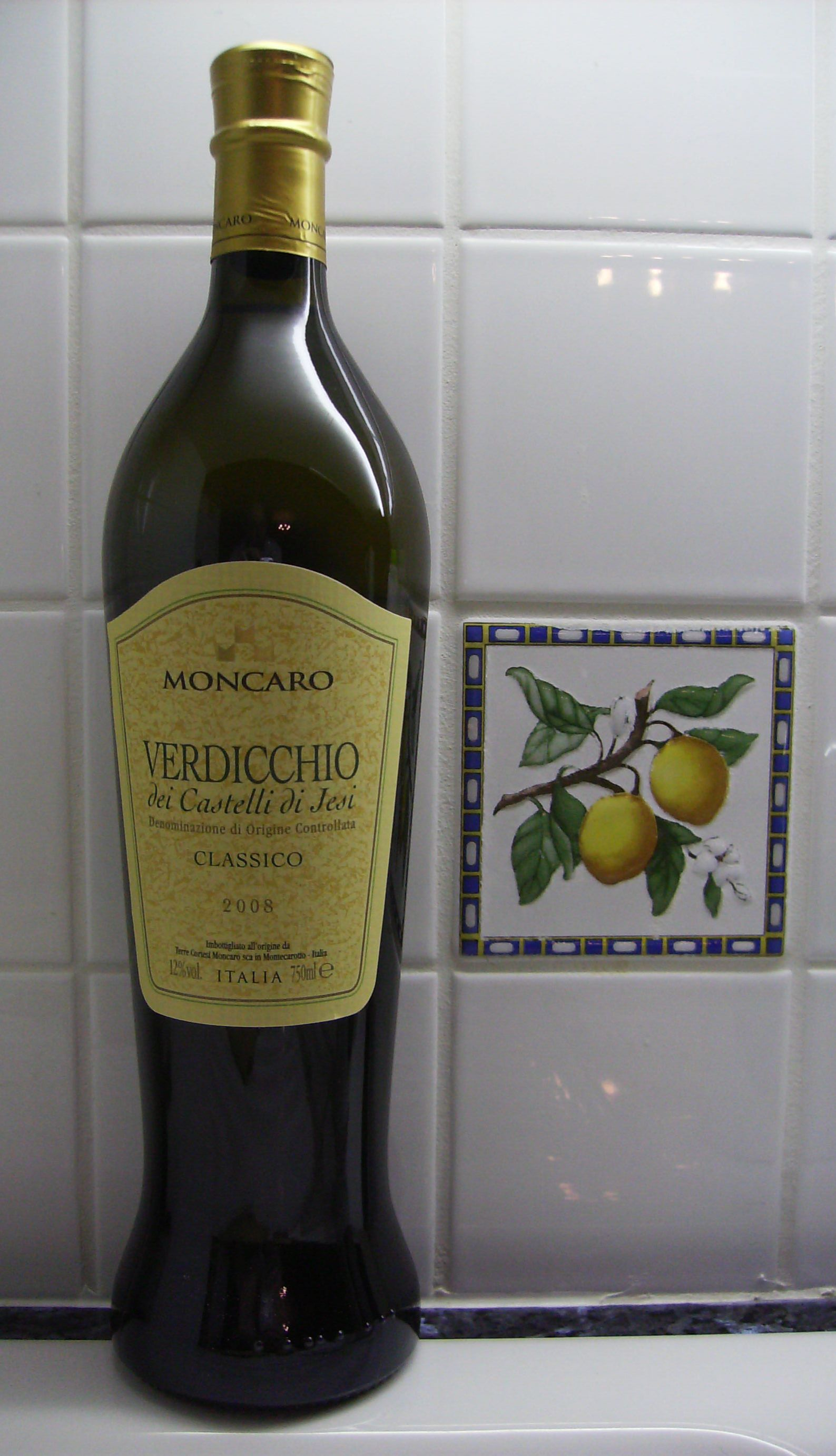 Verdicchio dei Castelli di Jesi - vin - Marches - Italie